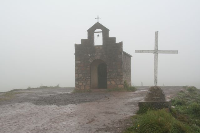 Kapelle am Piedra del Molina